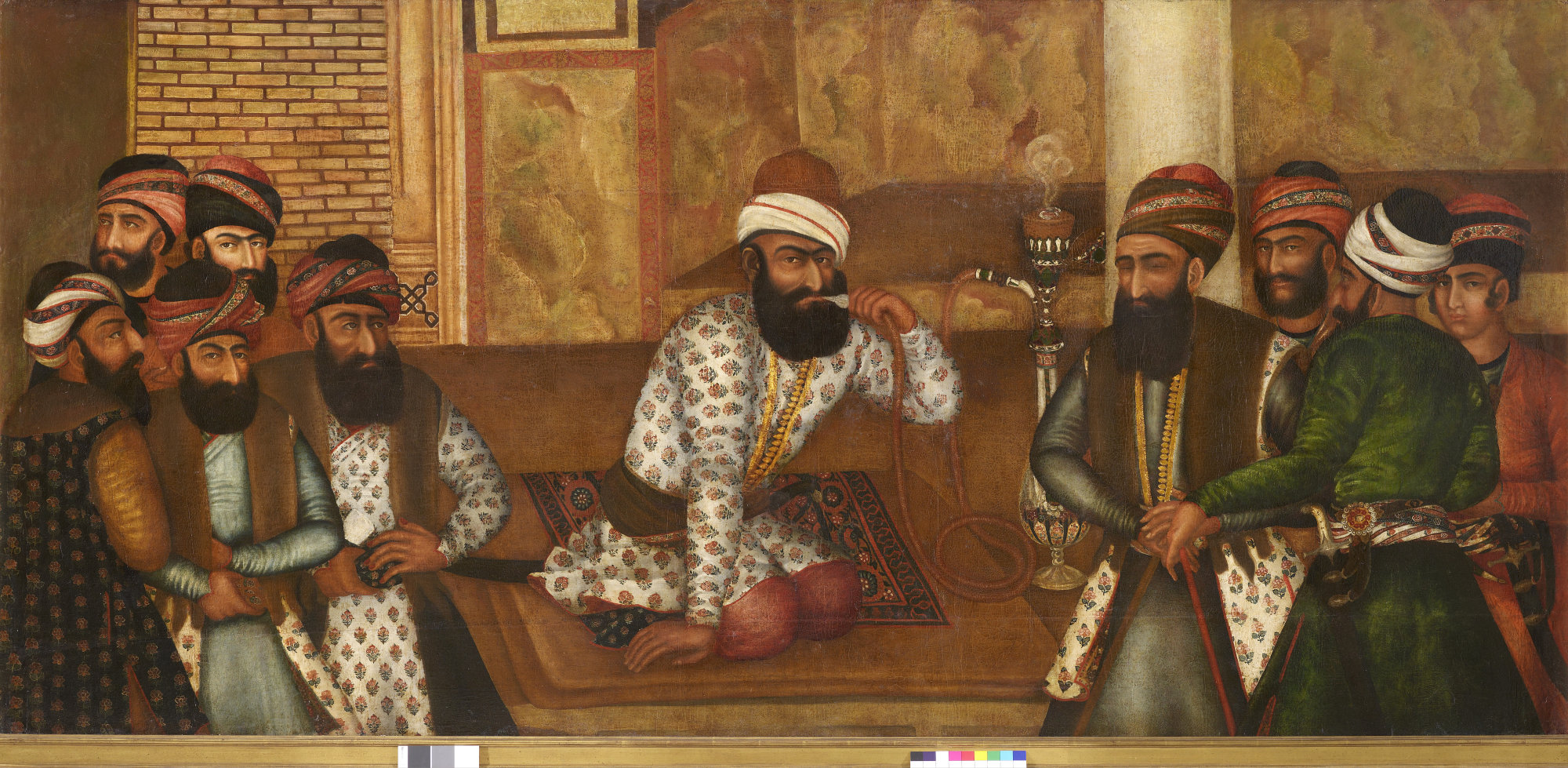 کریم خان زند و درباریان